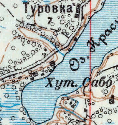 Топографическая карта Ленинградской области, квадрат VIc-28